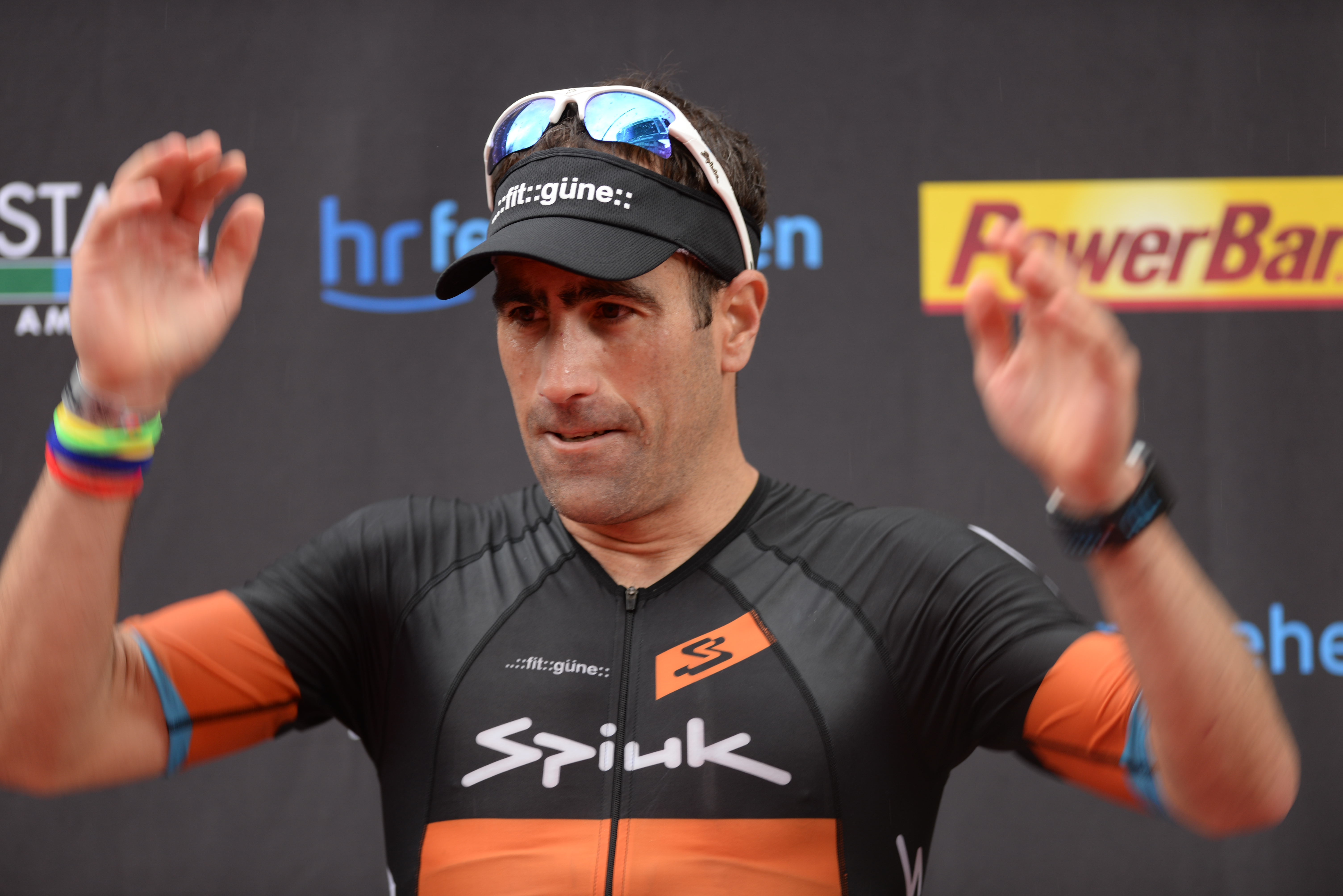 Ironman 2016, Starterlisten unter